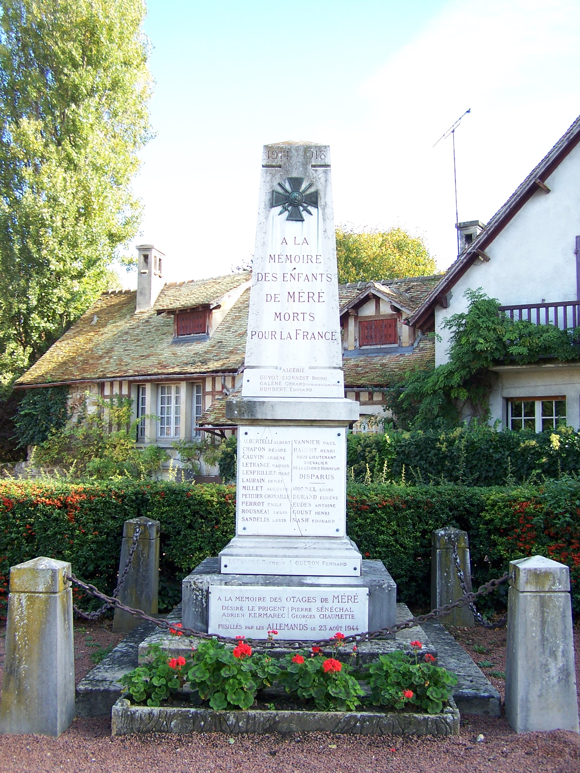 Monument aux morts de Méré (Yvelines, France)